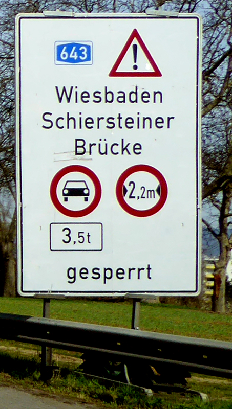 Hinweisschild auf der Autobahn zur Sperrung für Fahrzeuge über 3,5 t oder 2,2 Metern breite über die Schiersteiner Brücke